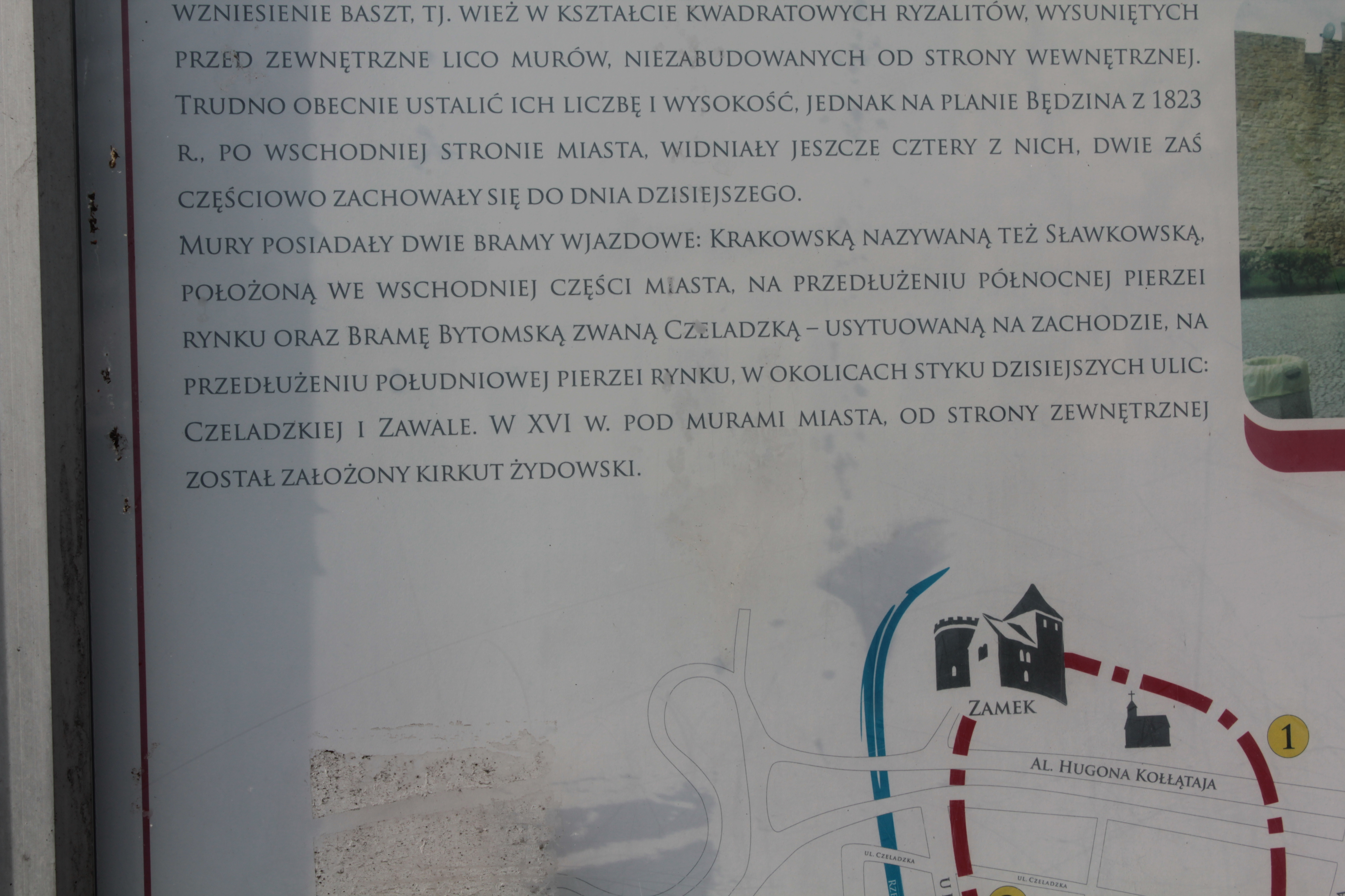 Stary Cmentarz Żydowski w Będzinie